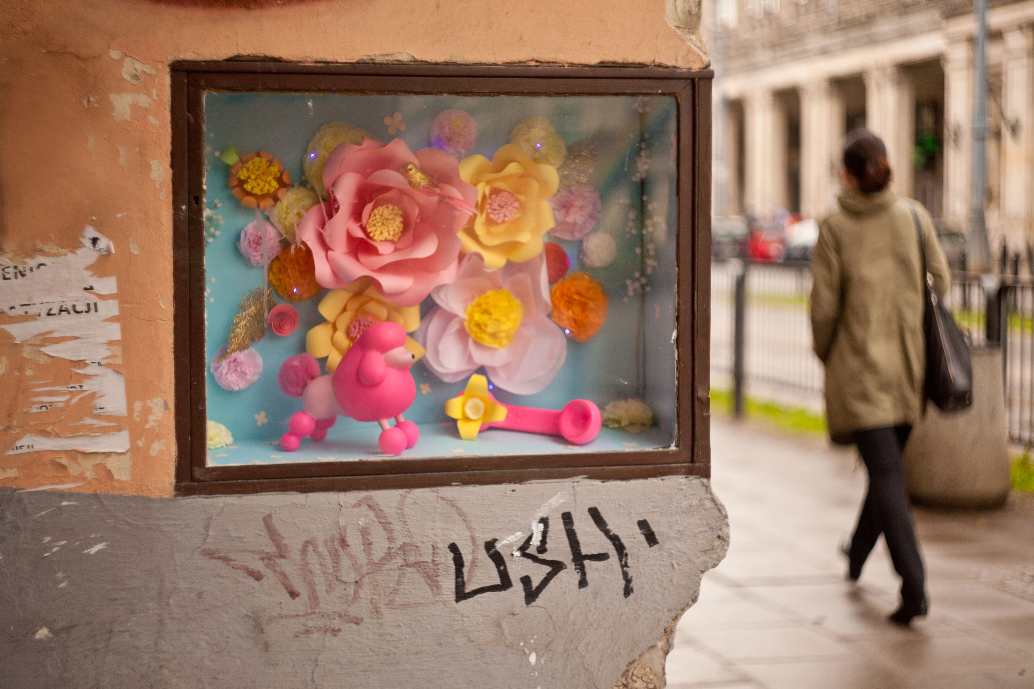 Gablotka Mirelli von Chrupek na ul. Marszałkowskiej 41